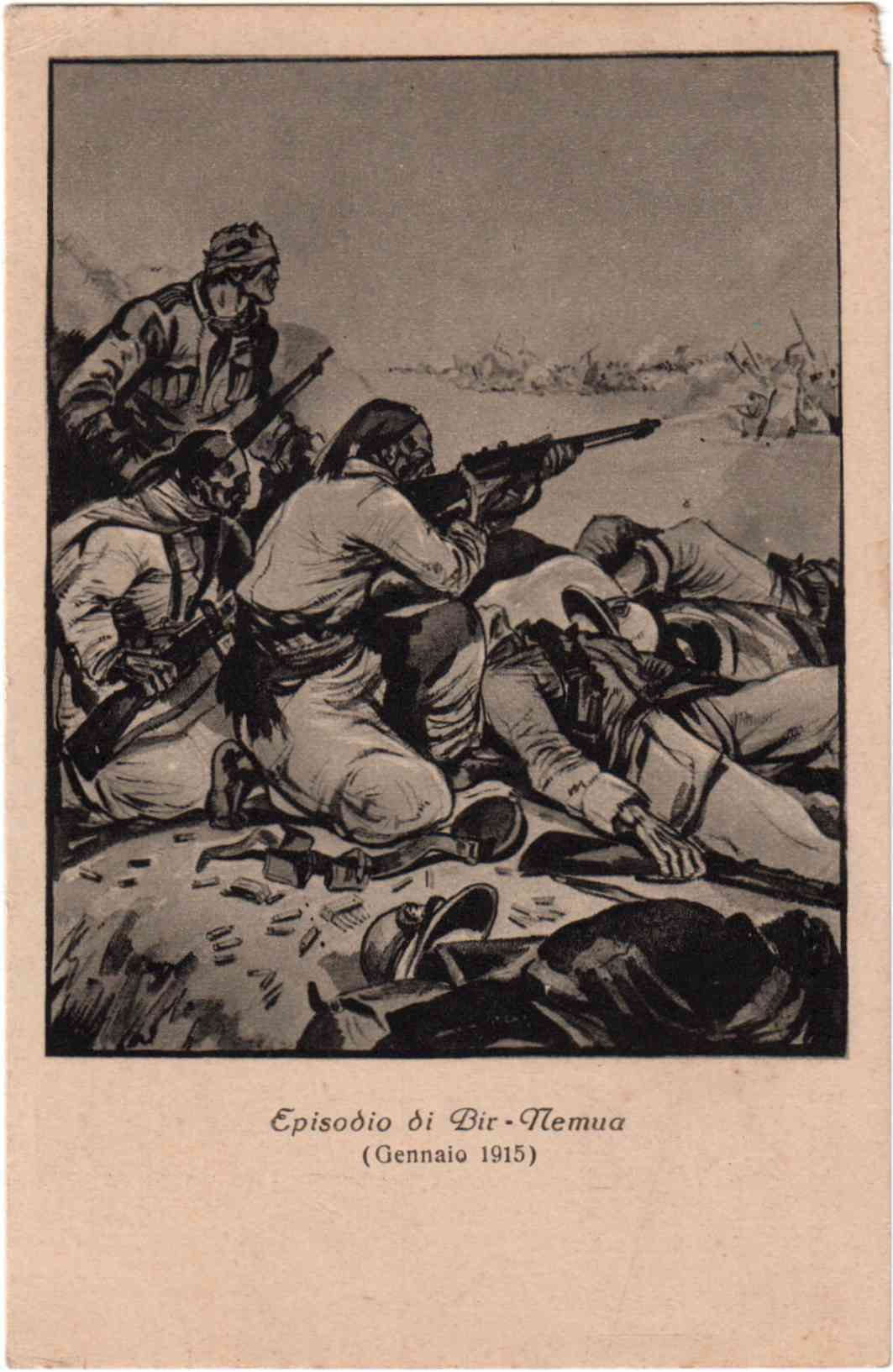 Libia- Tripolitania - Bir-Nemua - 13 Zaptiè ed un Carabiniere, al comando del Maresciallo Zenone Girolamo, assaliti da preponderanti forze avversarie, trovano morte gloriosa, dopo essersi eroicamente difesi fino all'ultima cartuccia. (Gennaio 1915)